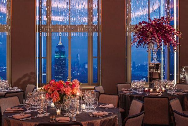 RONA a.s. je hrdá na možnosť prezentácie svojho skla v prestížnych priestoroch reštaurácie Rainbow Room, Rockefeller Center, NYC_rok 2015.